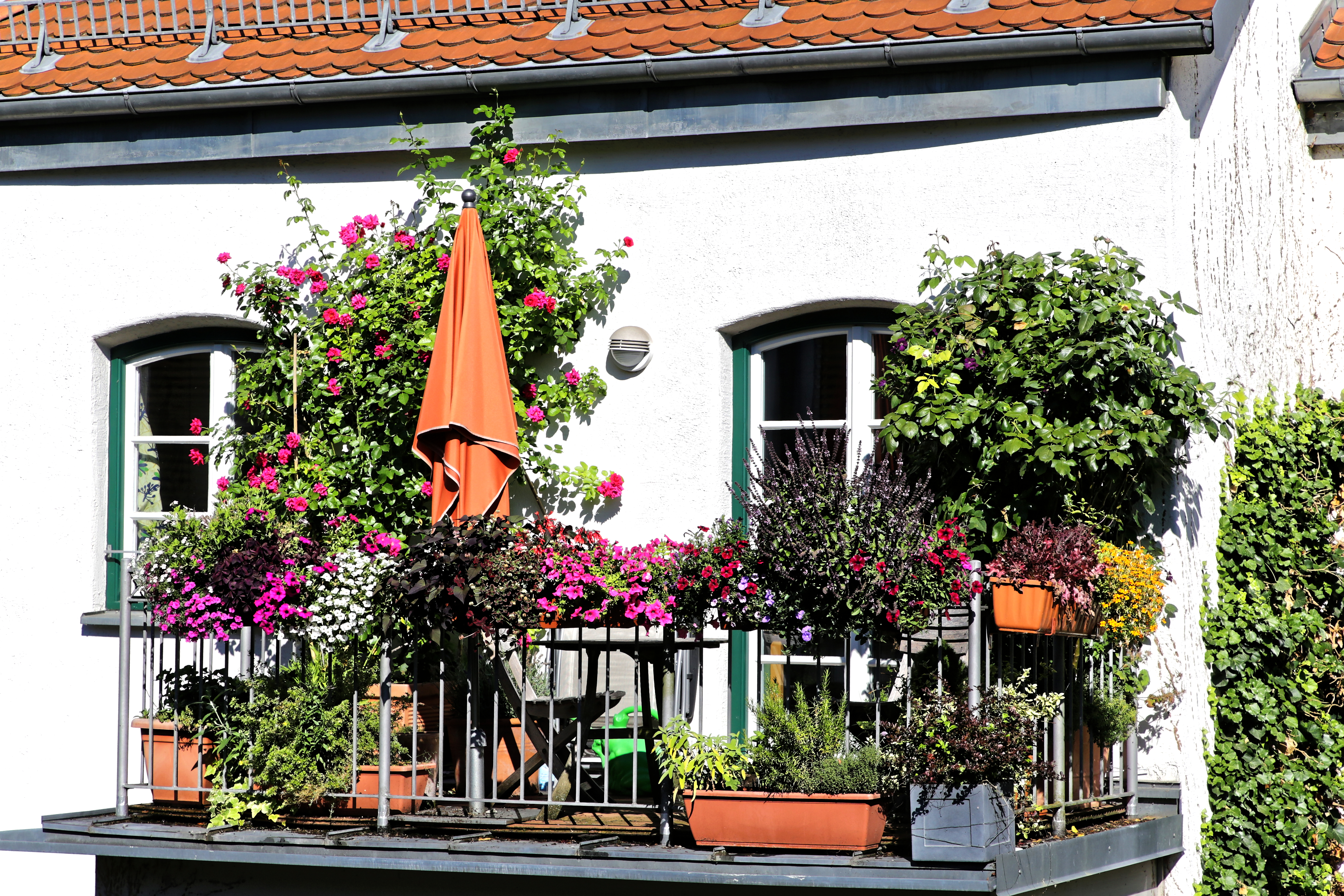 Vorbildlich gestaltete Terrasse mit Kletterrosen und Balkonblumen auf der Rückseite im 2. Stock des Valentinhauses